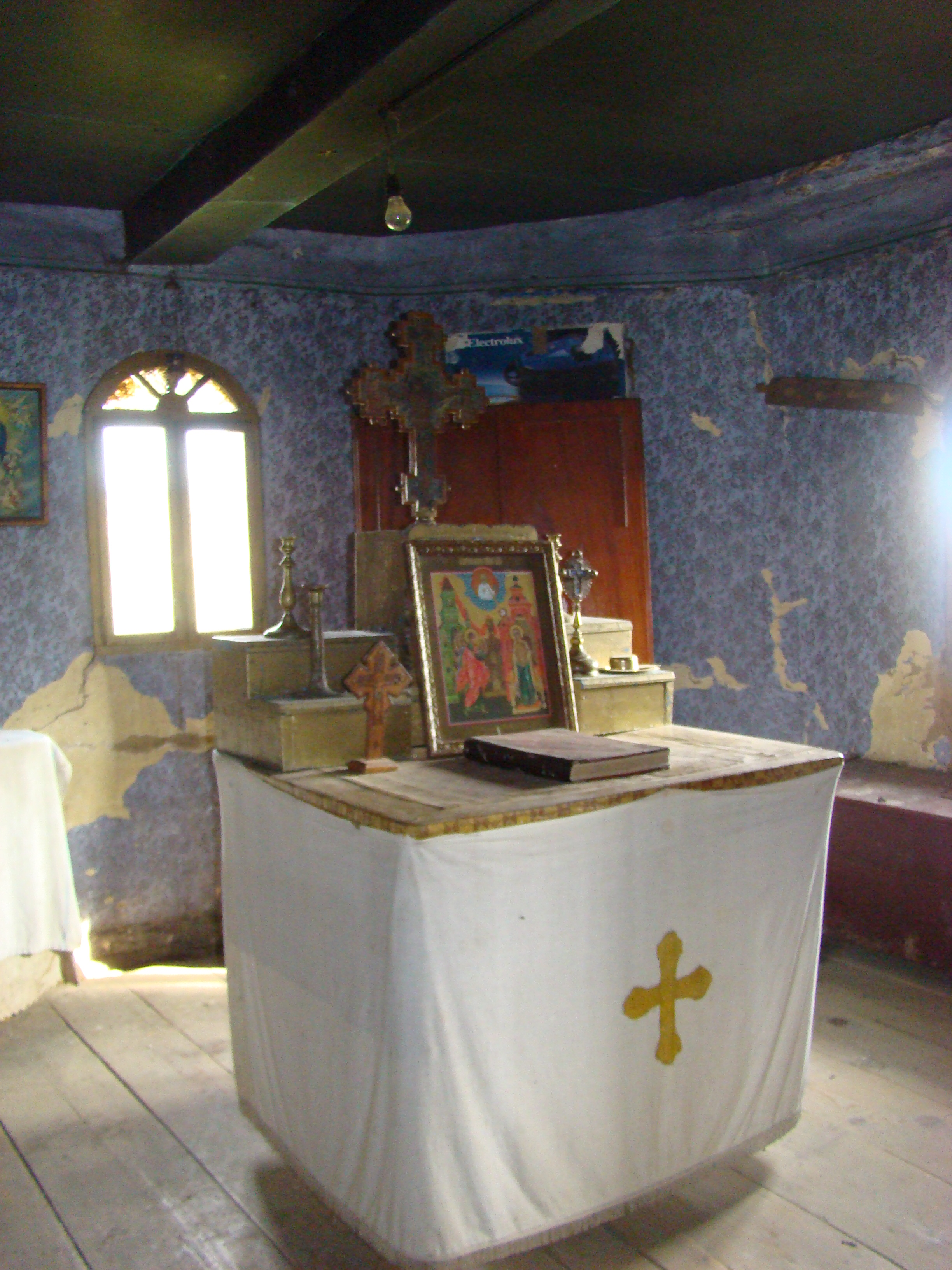 Biserica de lemn „Nașterea Maicii Domnului” din Săucani, județul Bihor